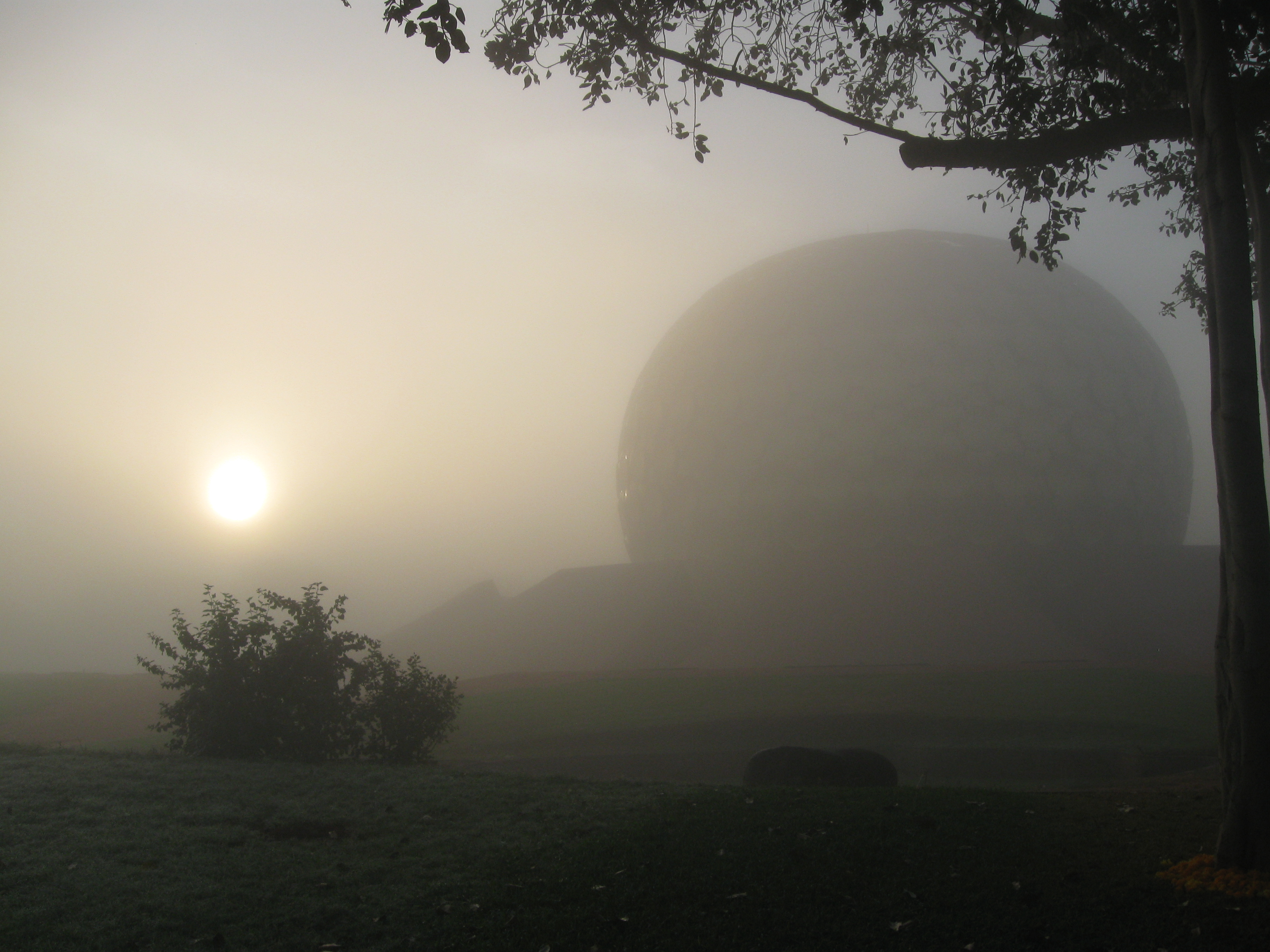 சர்வதேச நகரமாக உலகத்தவரால் போற்றப்படும் ஆரோவில் நகரம் தமிழ்நாட்டின் ஓருலகக் கருத்துணர்விற்குச் சரியான சான்றாக விளங்குகிறது. வைகறைப்பதி எனப் பெயர் பெறும் அதன் அழகை விளக்கும் அதிகாலைப் பொழுதின் காட்சி